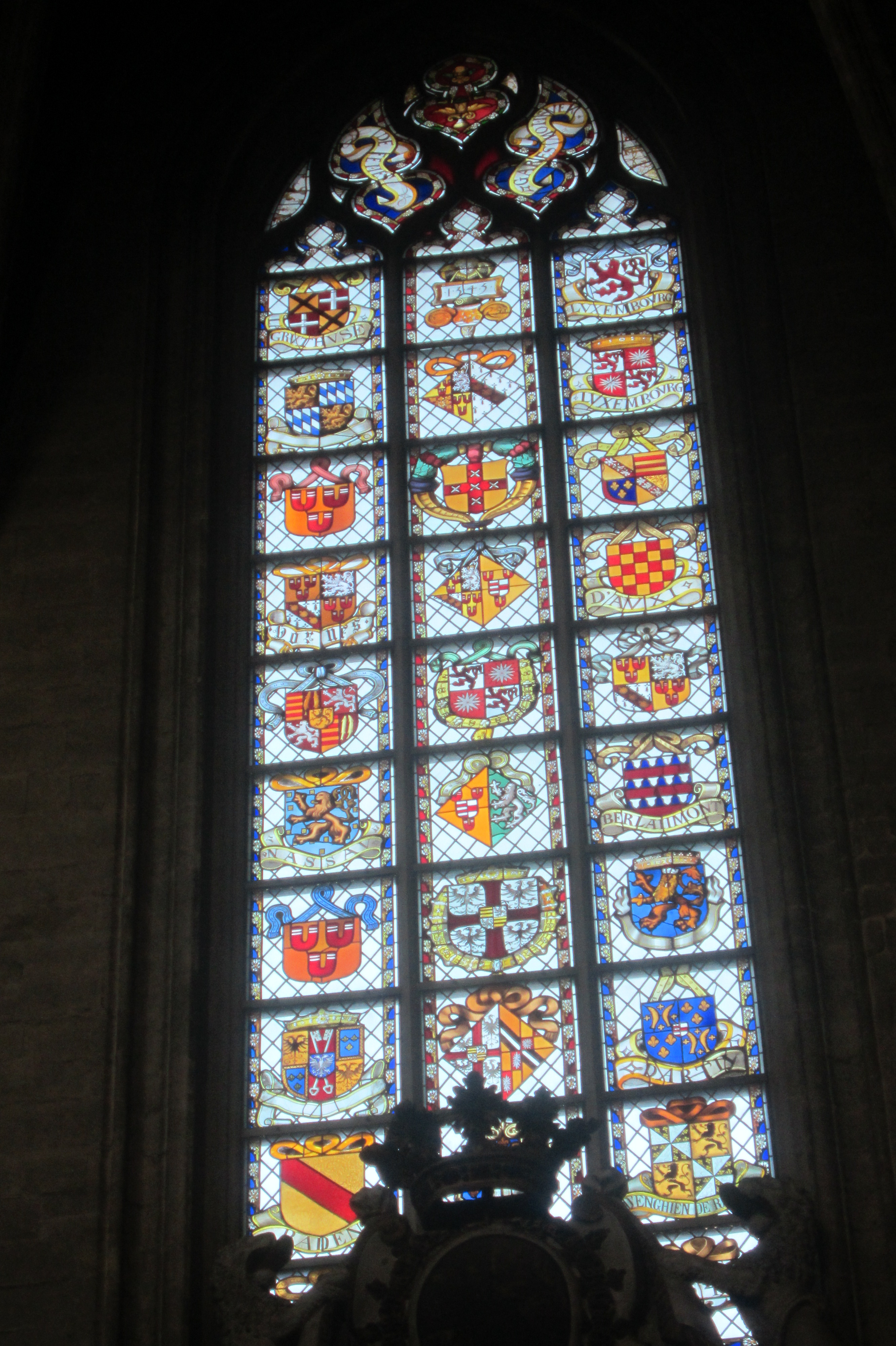 Gebrandschilderd glasraam in de Onze-Lieve-Vrouw-ter-Zavel, Brussel, met heraldische wapens